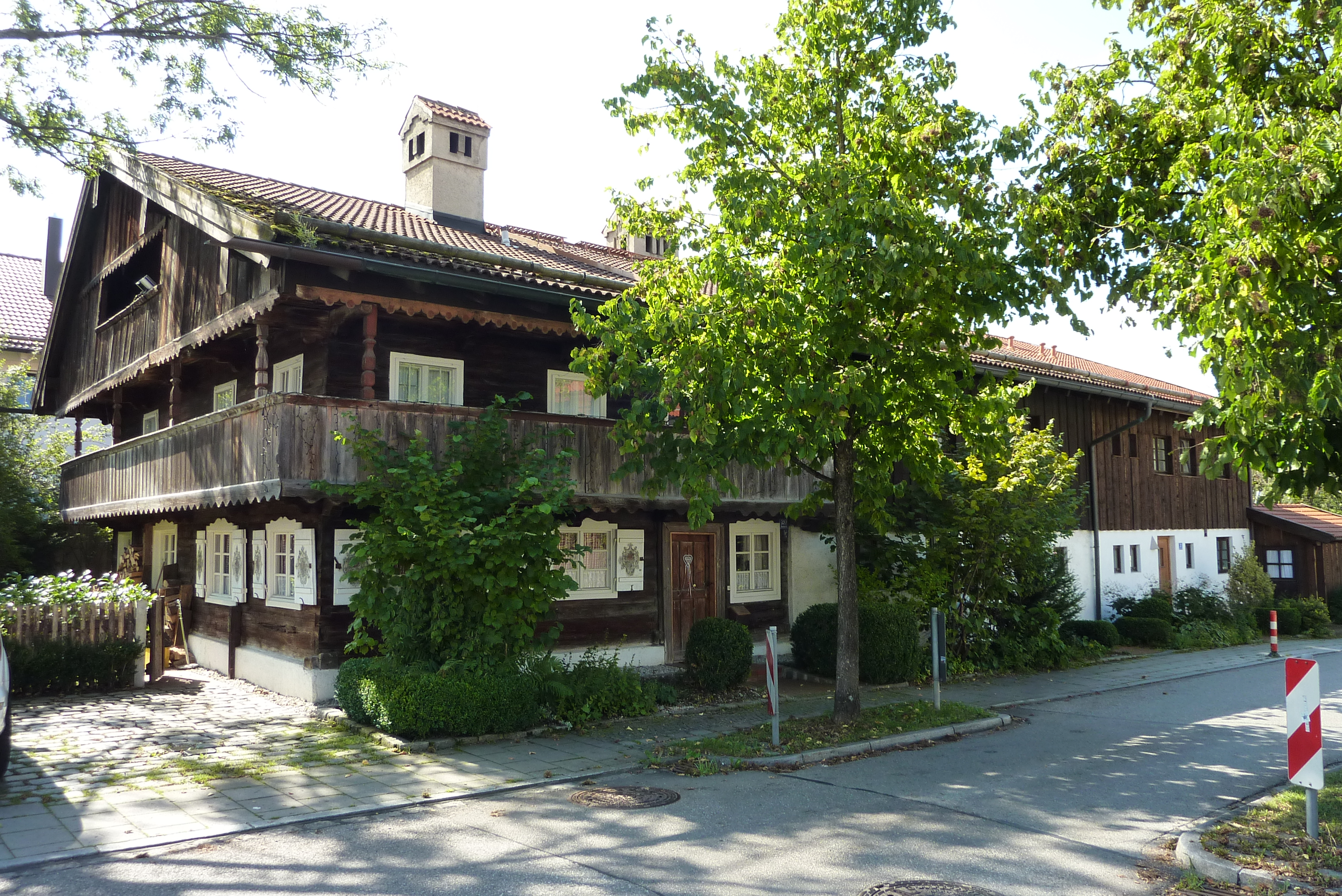 Taufkirchen, Hohenbrunner Weg 20, Beim Kaindl, (Ehem. Bauernhaus), Wohnteil zweigeschossiger Blockbau, mit Laube, 1776 (Wirtschaftsteil 1980 ausgebaut) Denkmal-Nummer D-1-84-145-1 Standort: 48.041882 11.622505